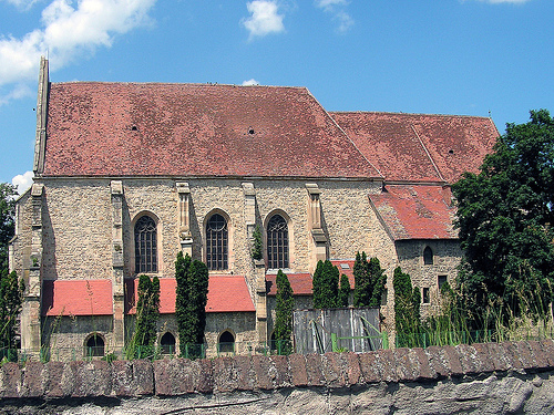 Reformed Church in Cluj / Kolozsvár / Klausenburg (Romania)